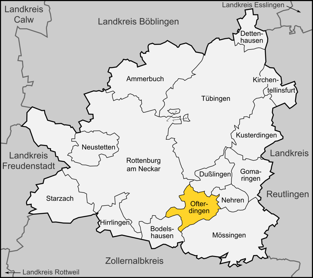 Karte der Gemeinde Ofterdingen im Landkreis Tübingen